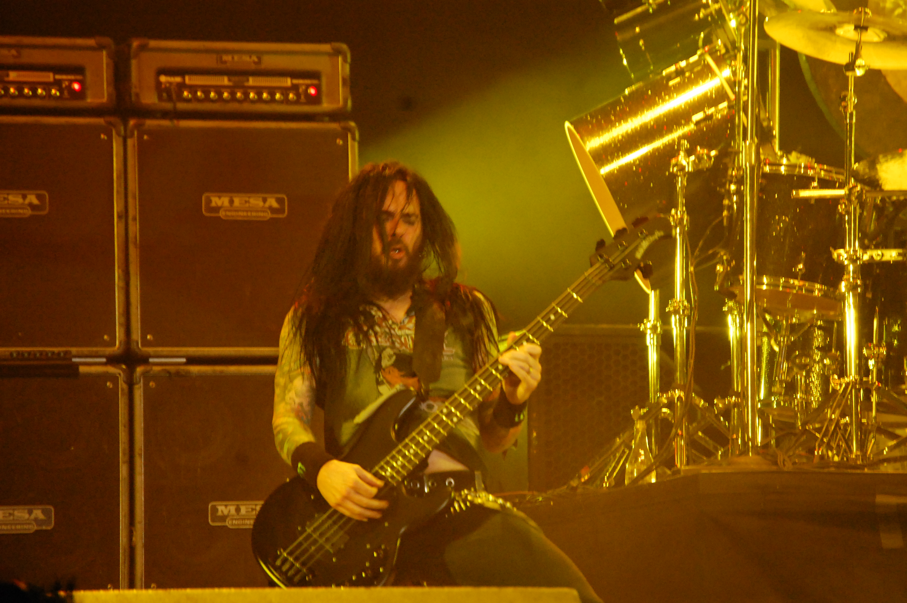 Blasko, bajista de Ozzy Osbourne, actuando en Chile.